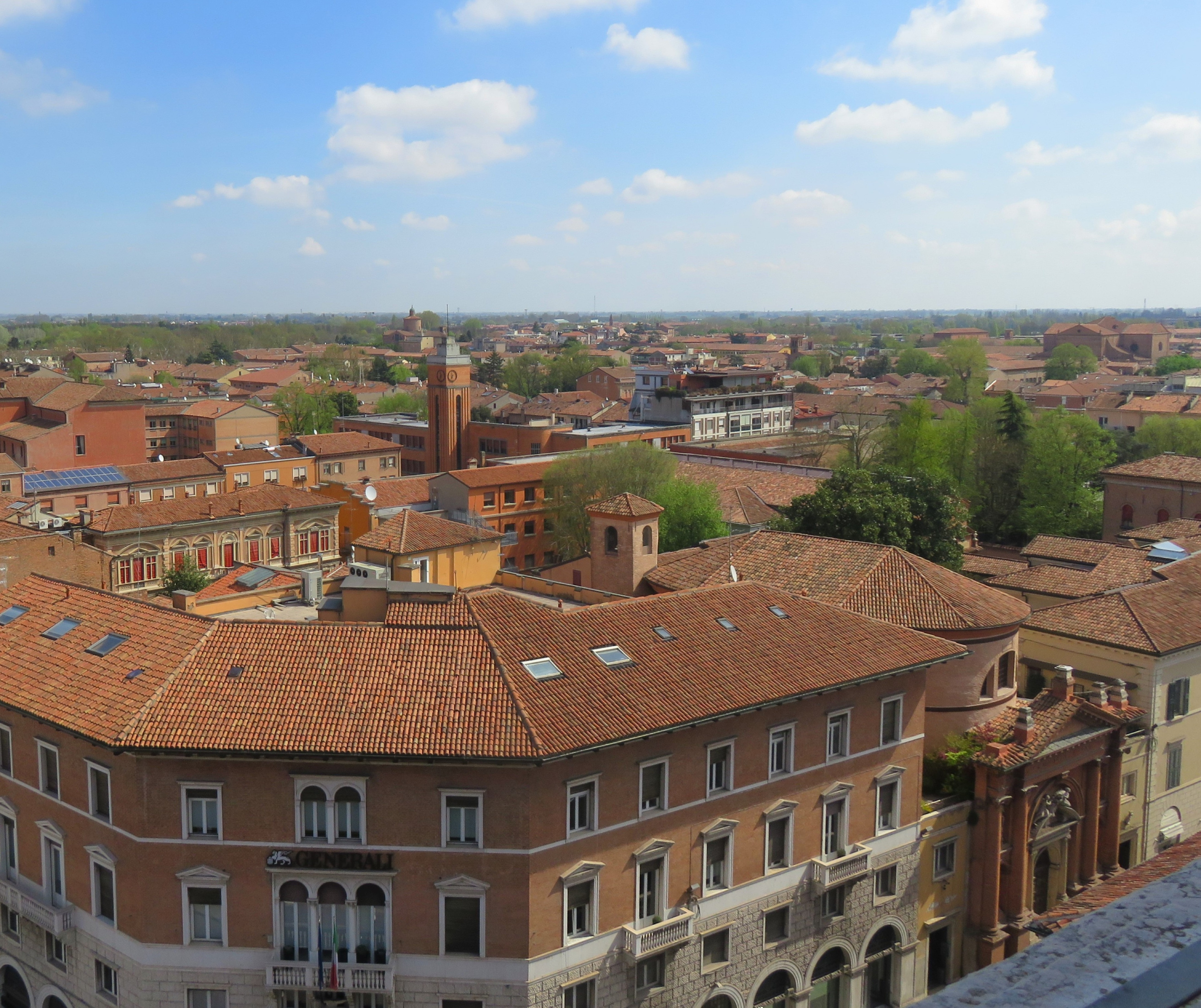 Palazzo Assicurazioni Generali visto dalla Torre dei Leoni del Castello Estense. Sullo sfondo l'area ex Sant'Anna